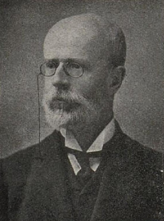 Vojtěch hrabě Schönborn (1854-1924), rakousko-uherský, respektive český šlechtic, právník a politik